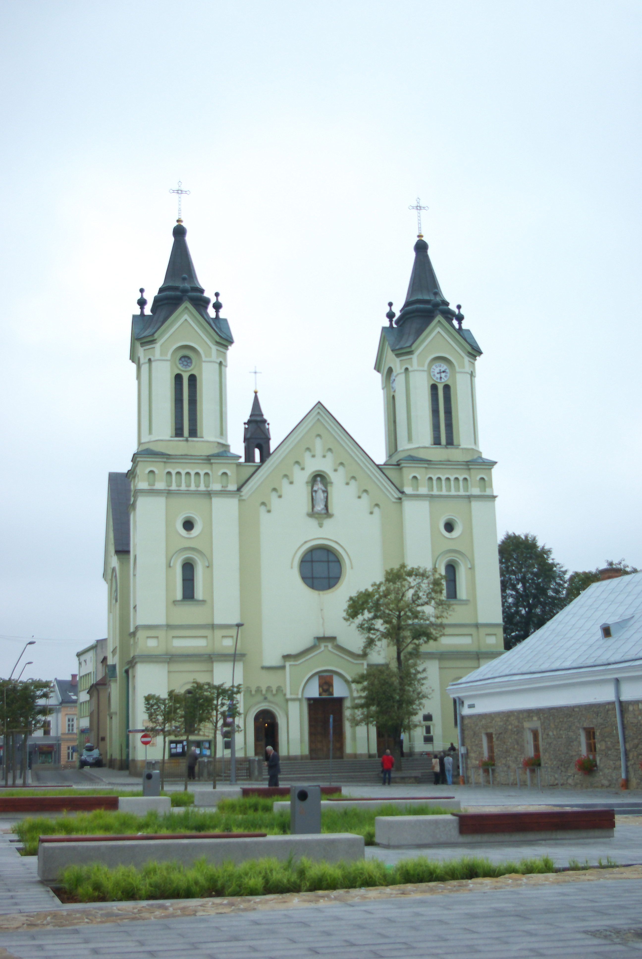 Plac Świętego Michała w Sanoku.